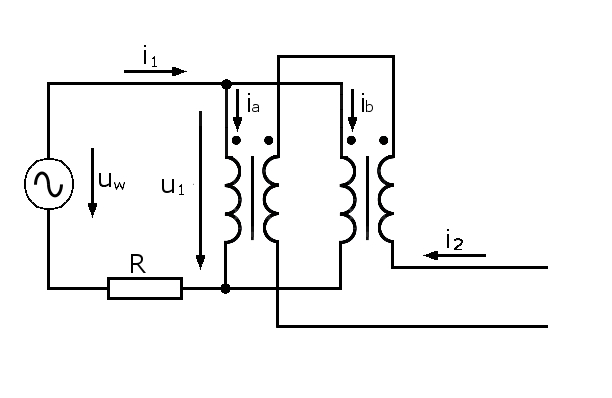 Zusammenschaltung von zwei Transduktoren zu einer Gegentaktschaltung